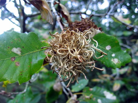 gall on Quercus boissieri, Israel.